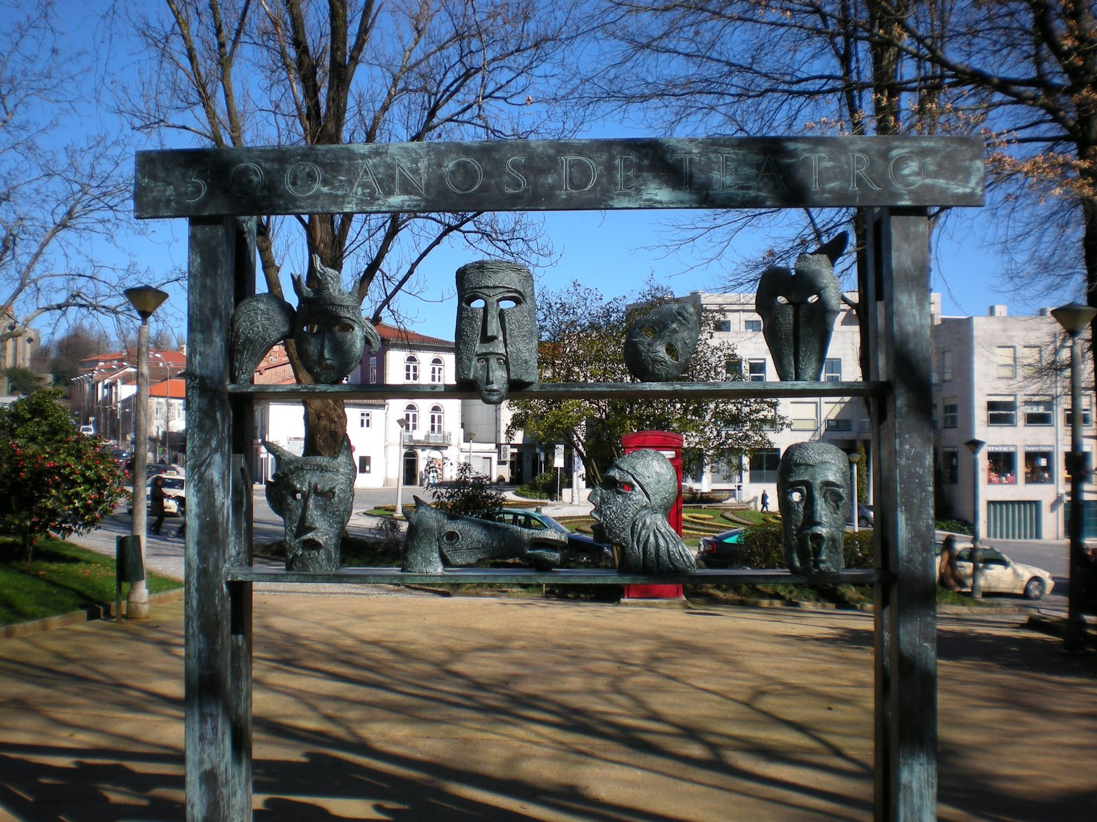 Monumento aos 500 anos do Teatro Português na Alameda de São Damâso.